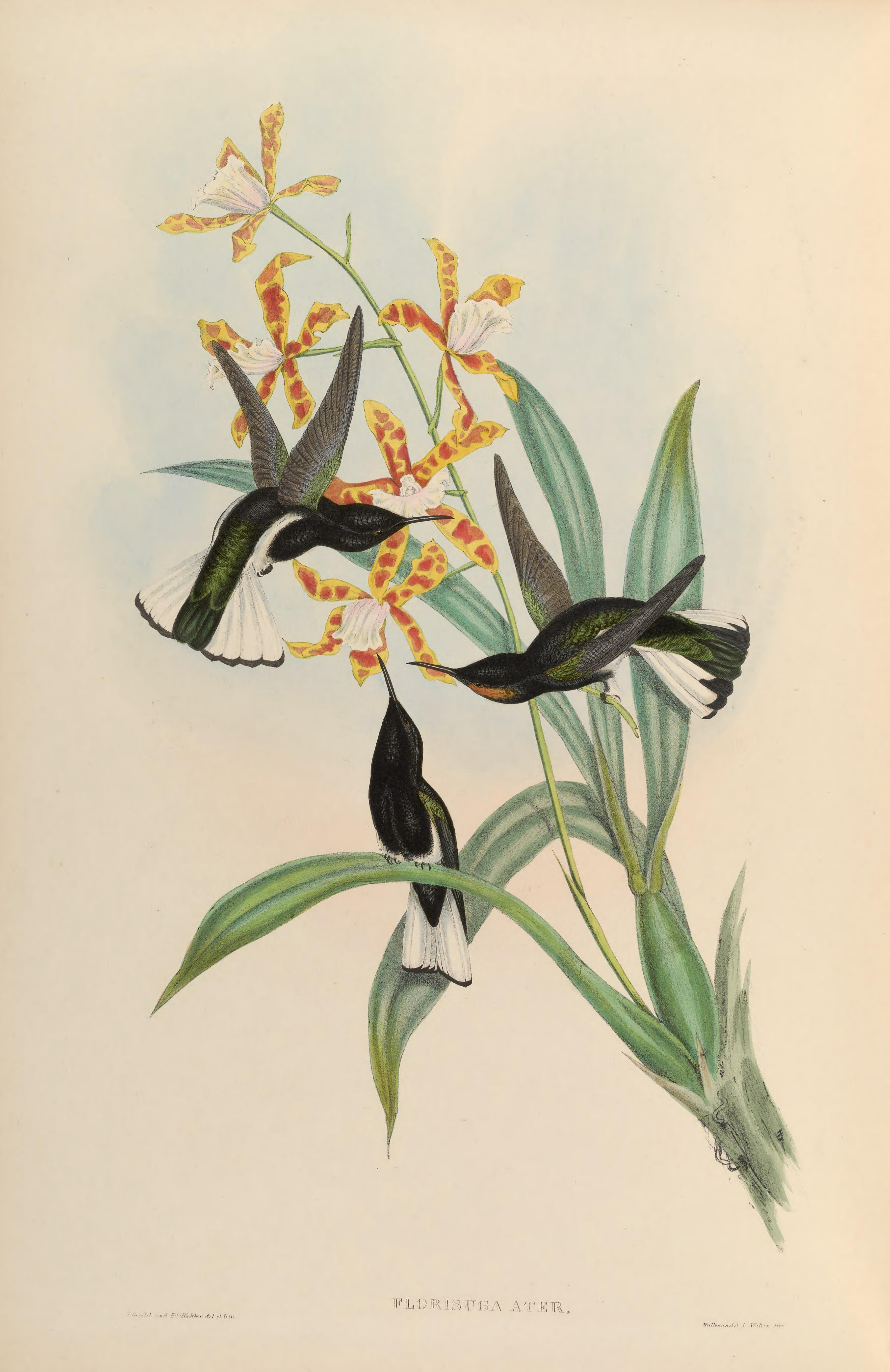 Florisuga atra = Florisuga fusca [1]